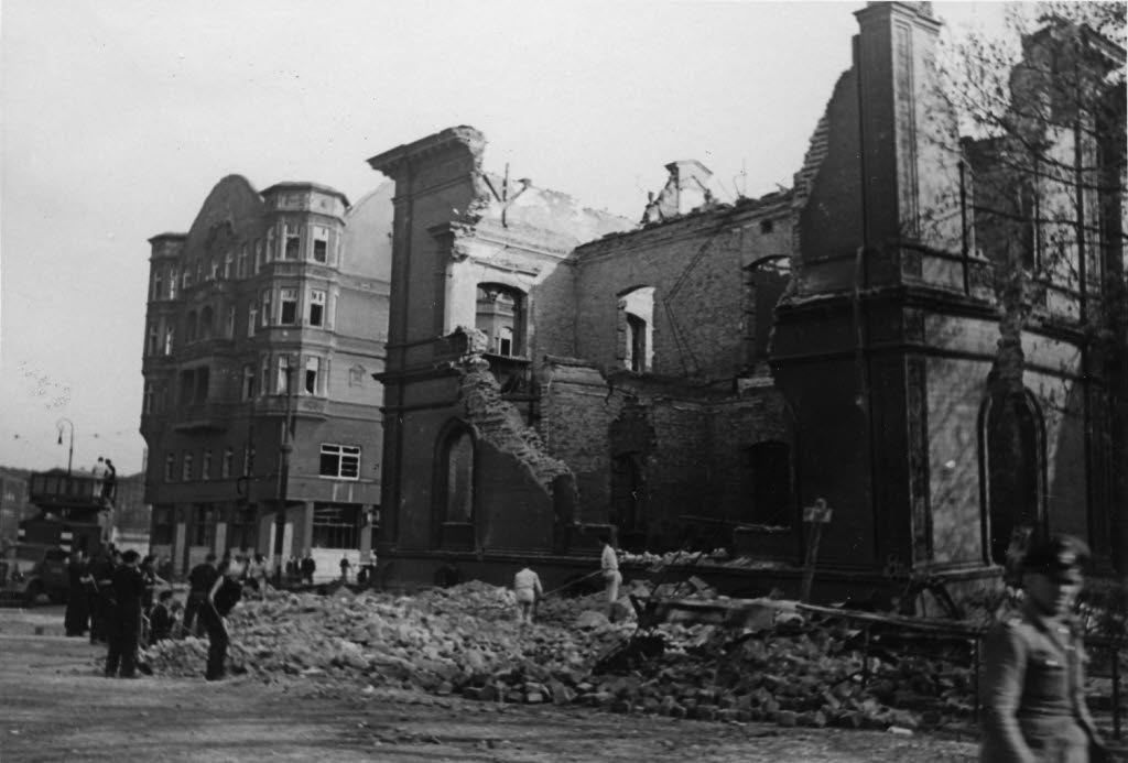 Thaulow-Museum am Sophienblatt 2. Volltreffer. Im Hintergrund links das Victoria-Eck (Sophienblatt 1).